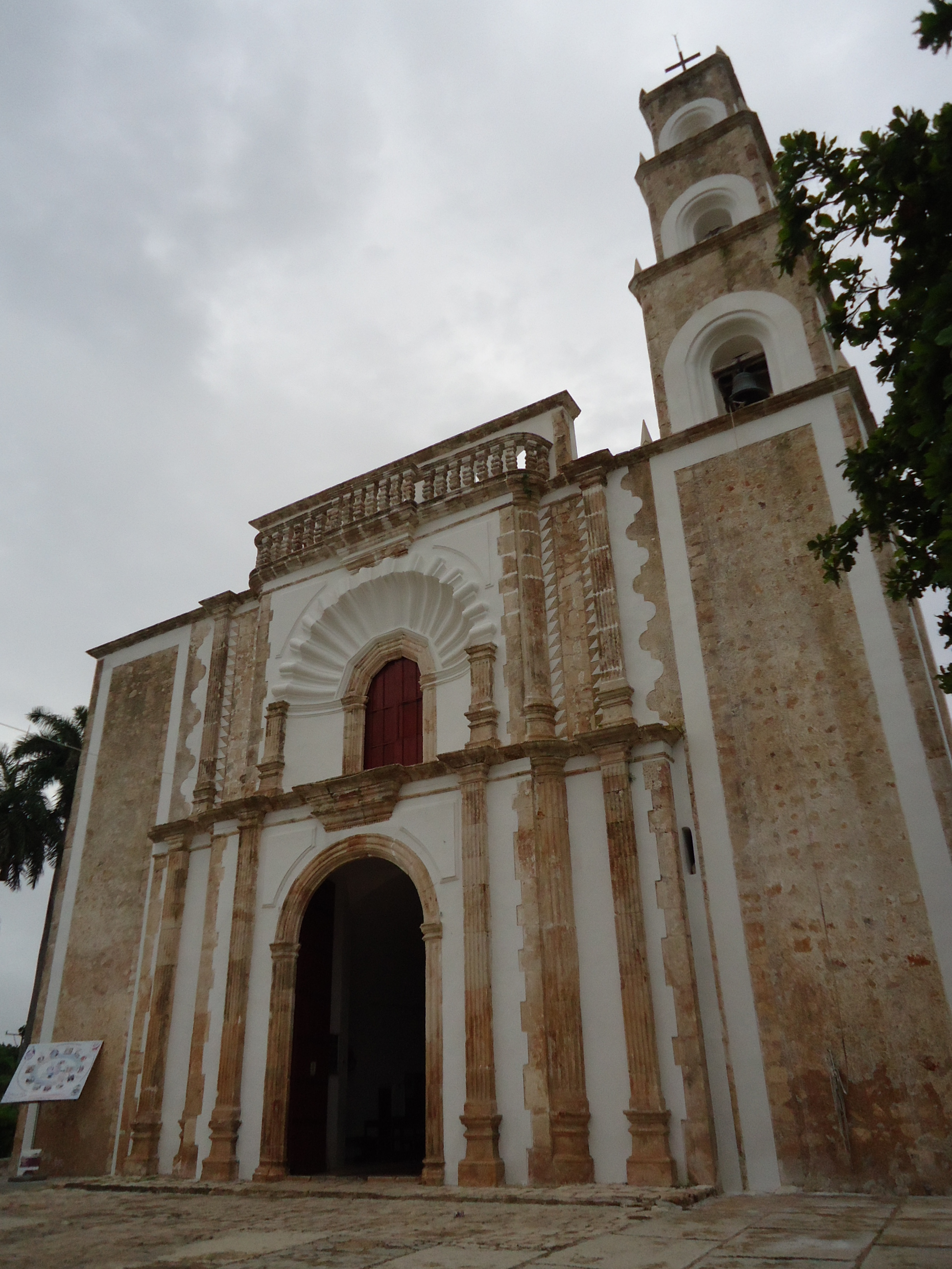 Iglesia de Calkiní.